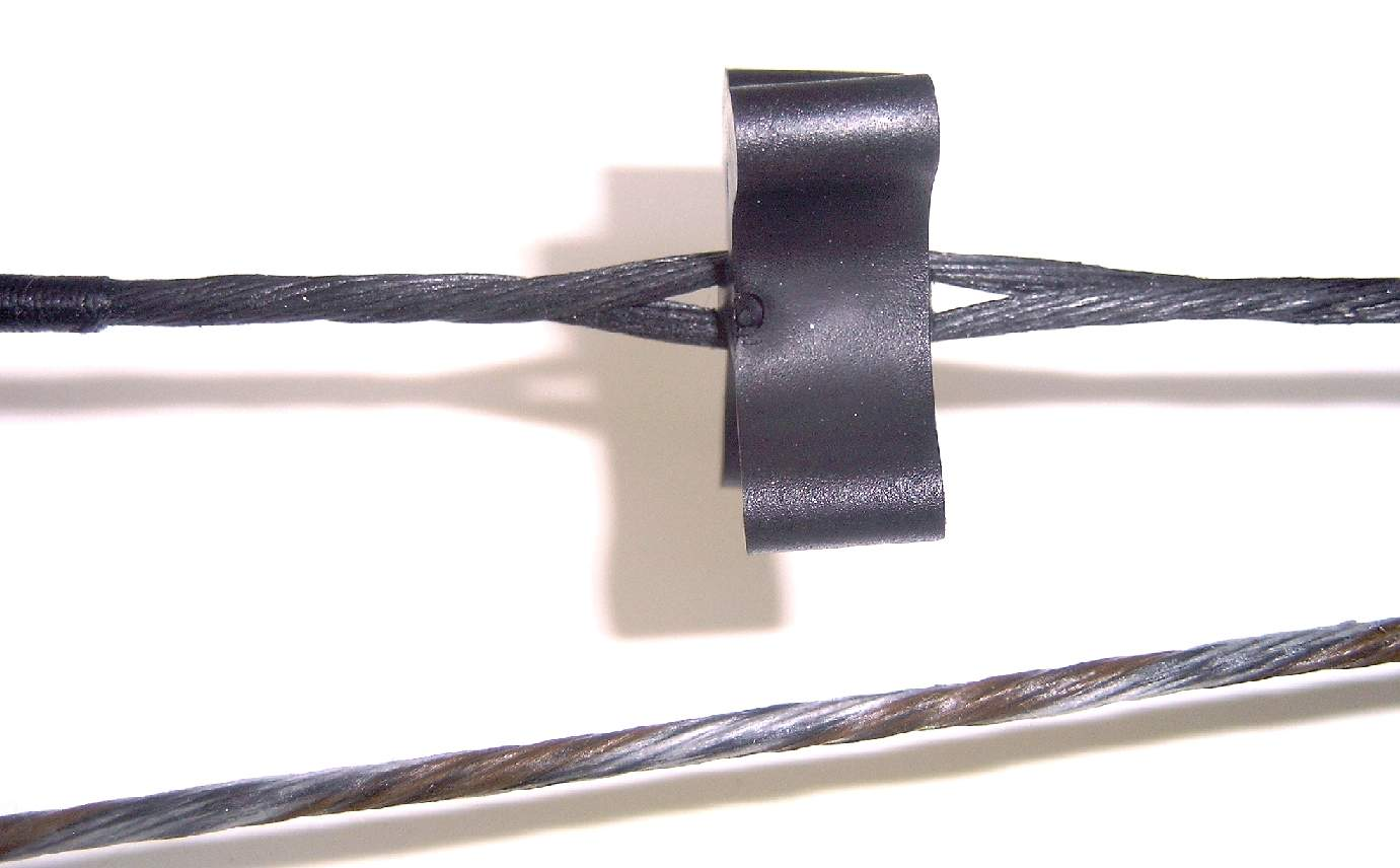 Zebrasehne neben einem Sehnen-Geräuschdämpfer.